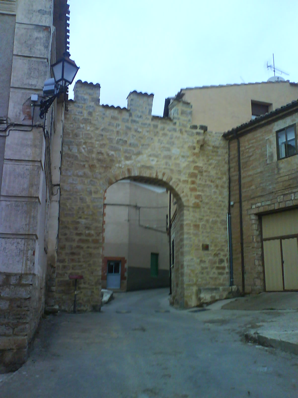 Puerta de la muralla de Pampliega (Burgos, España), llamada "Puerta de Presencio".